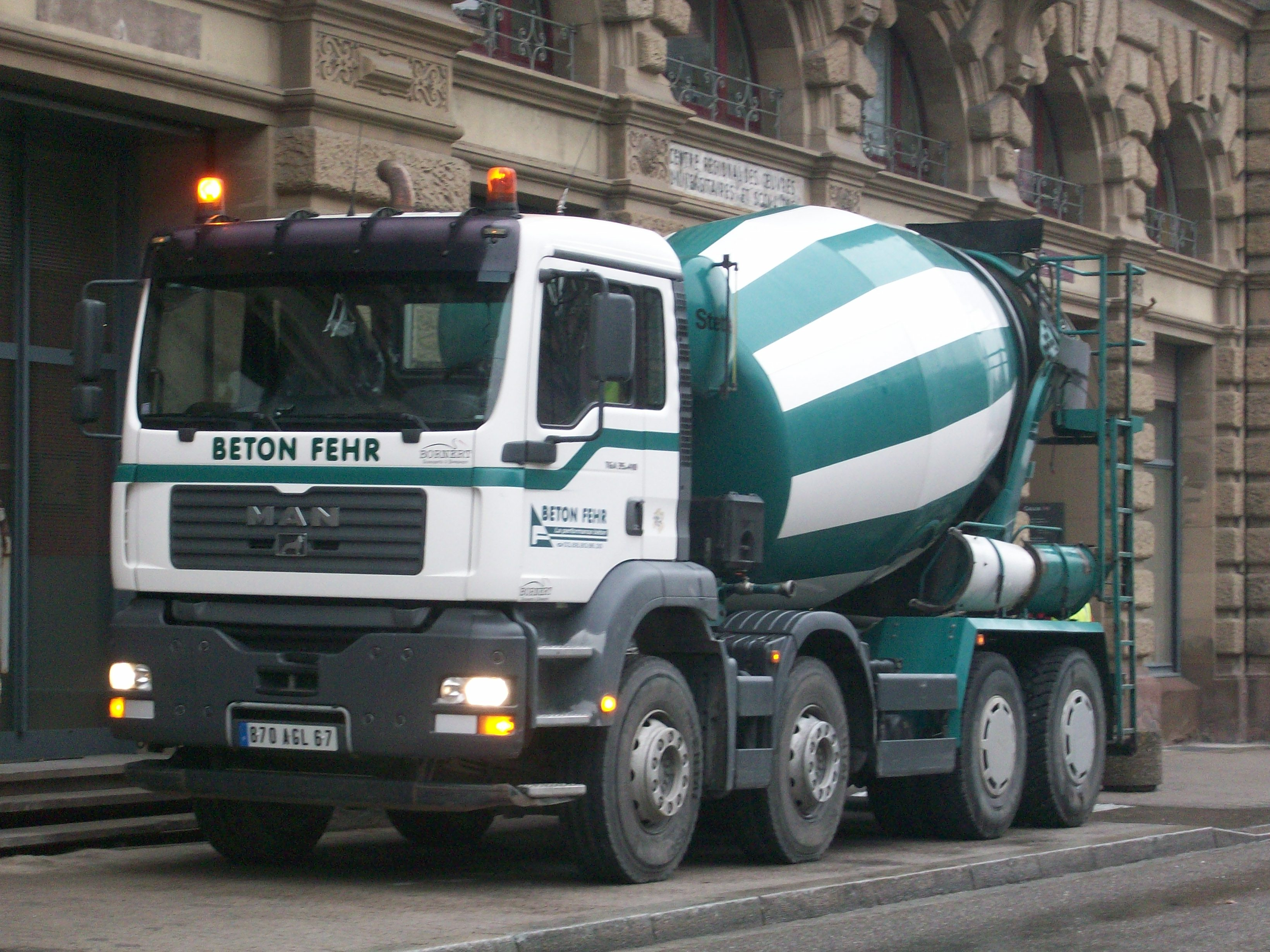 Camion de ciment MAN à Gallia,Strasbourg